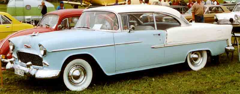 Chevrolet 2454 Bel Air 1955